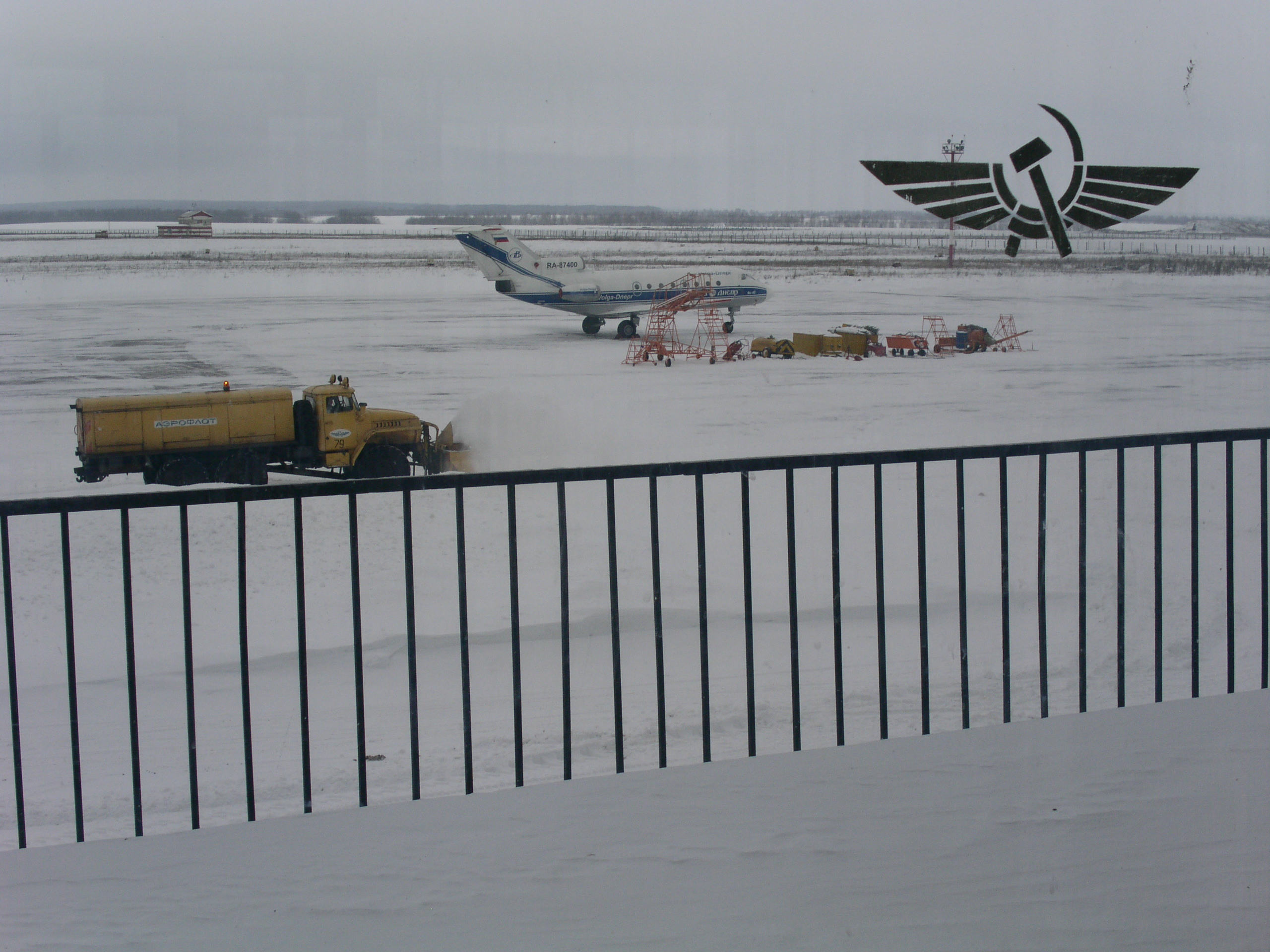 Volga-Dnepr Yak-40 in Ulyanovsk-Central Airport (Baratayevka)